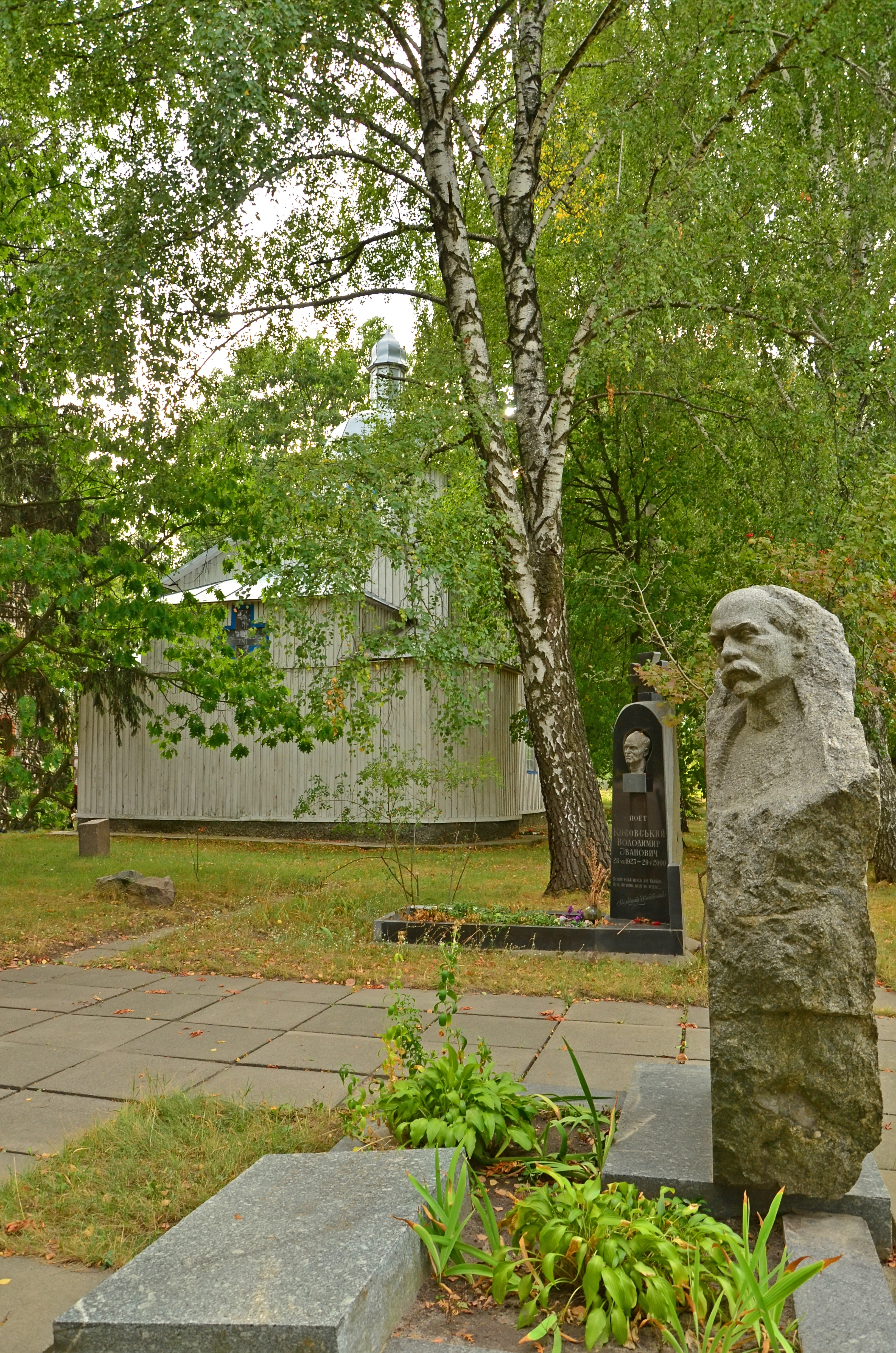 Пам'ятник композитору К. Г. Стеценка, село Веприк, біля церкви